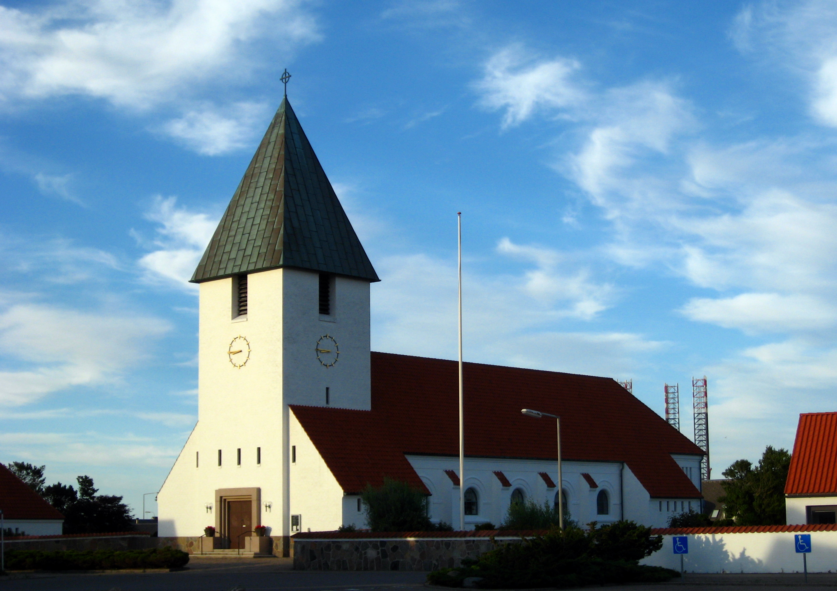 Hirtshals Kirke